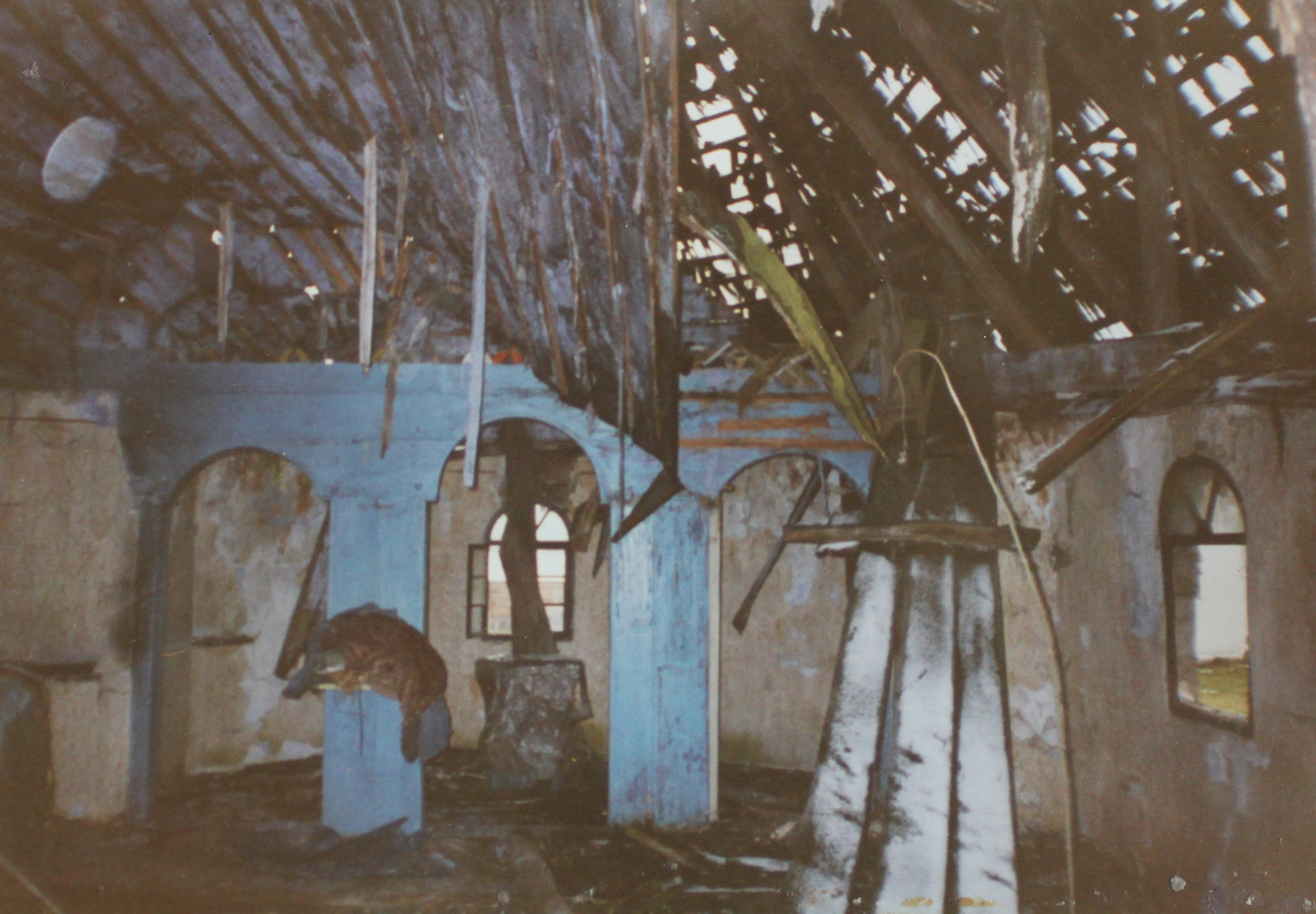 Biserica de lemn din Solona, judeţul Sălaj.